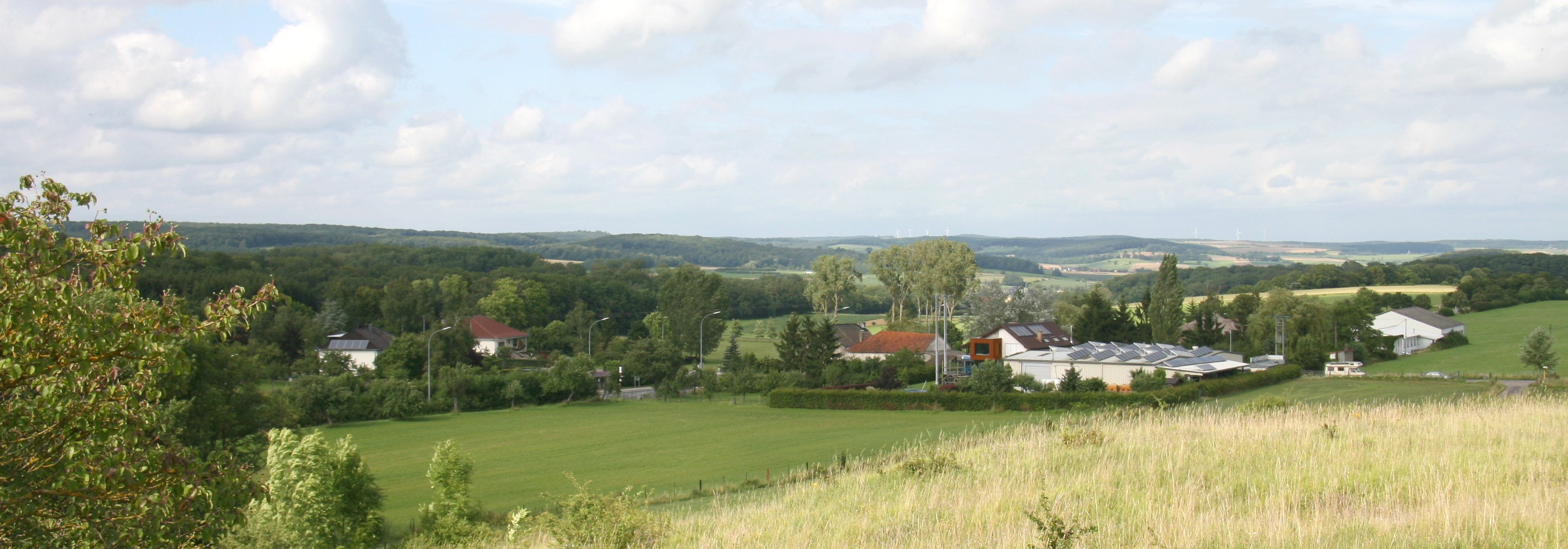 Banzelt, Sektioun Ouljen, Gemeng Betzder